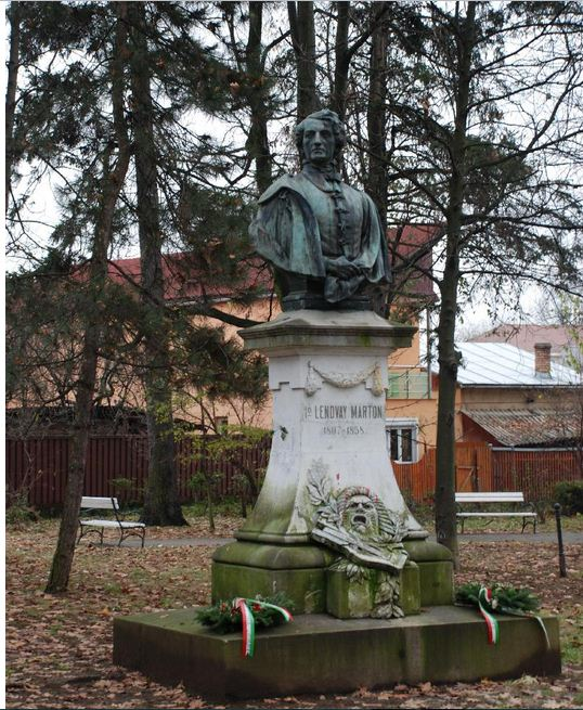 Monumentul actorului Marton Lendvay